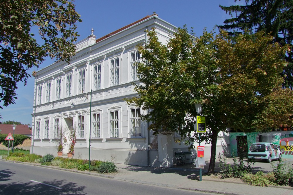 Kindergarten, ehem. Volksschule